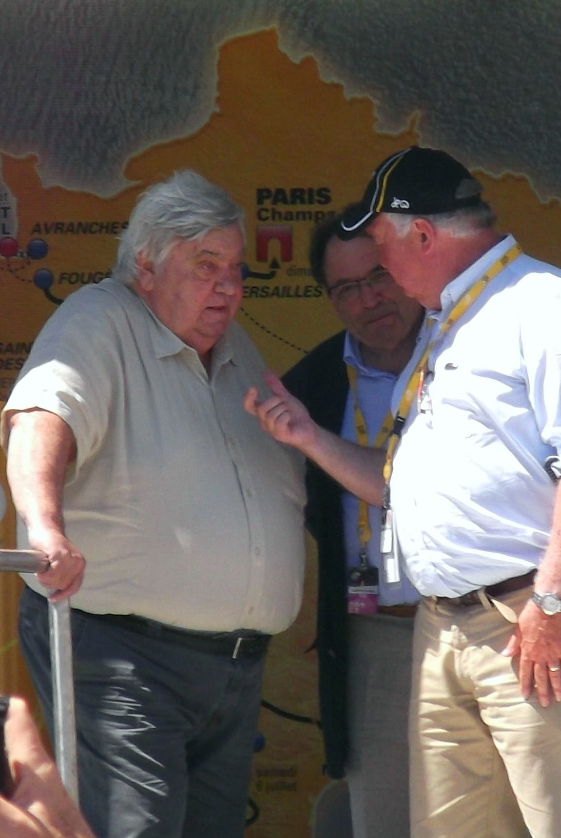 Louis Nicollin sur le podium Tour de France 2013.